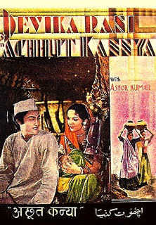 Poster de Achhut Kannya (1936)